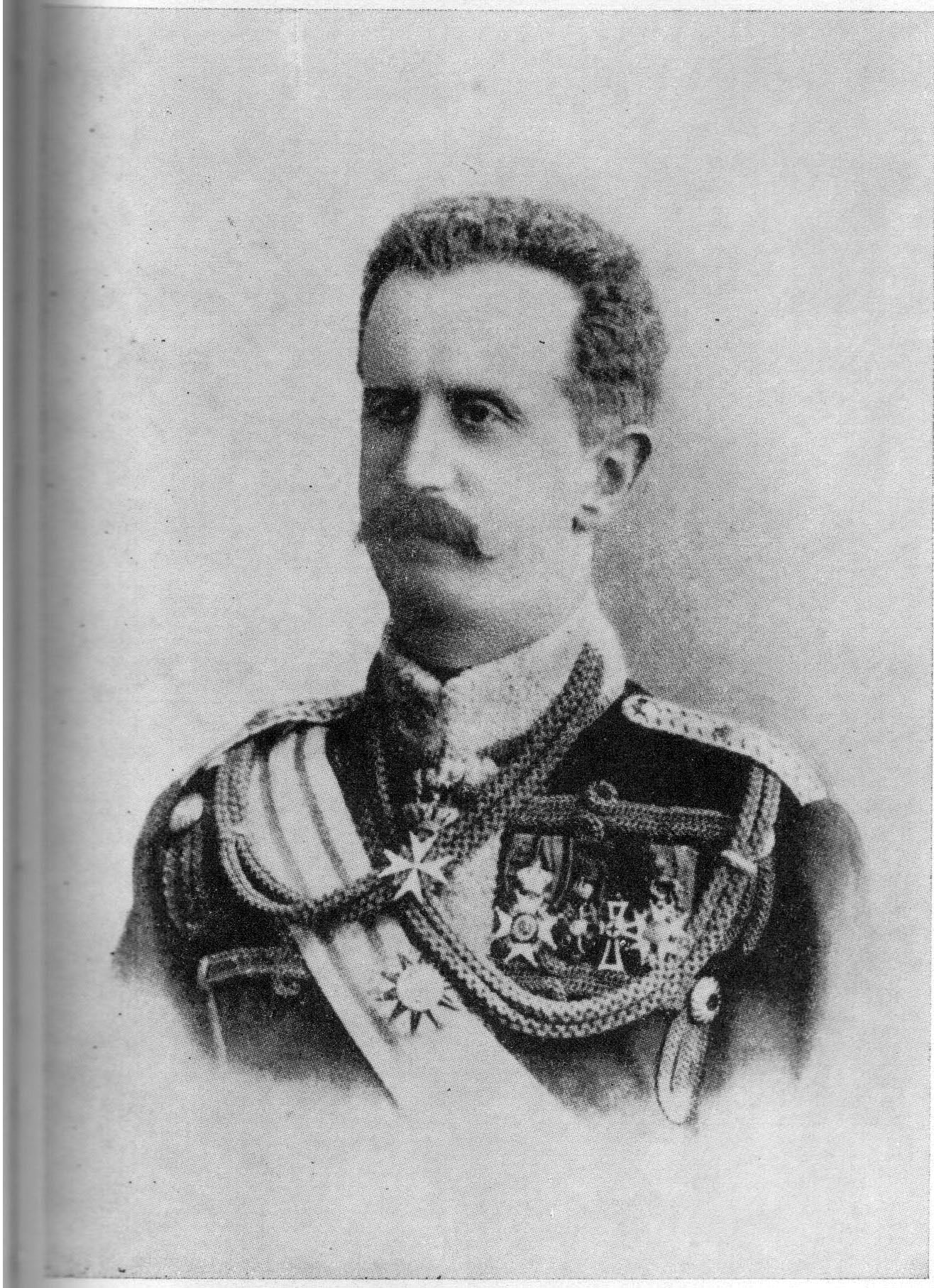 Bogdan Franciszek Serwacy Hutten-Czapski h. Leliwa, (niem. Bogdan Graf von Hutten-Czapski, ur. 13 maja 1851 w Smogulcu – zm. 7 września 1937 w Poznaniu).